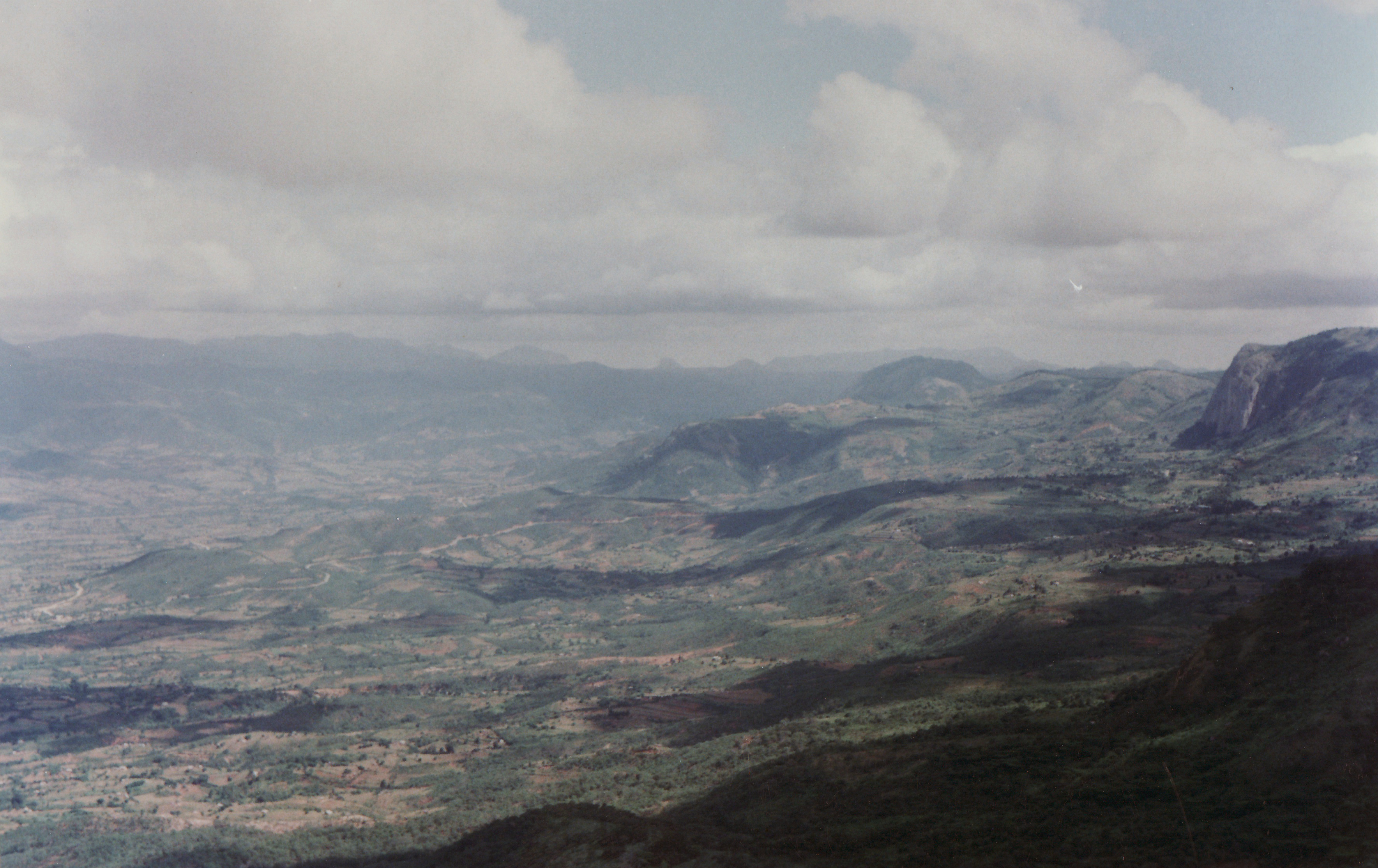 Honde Valley 1996